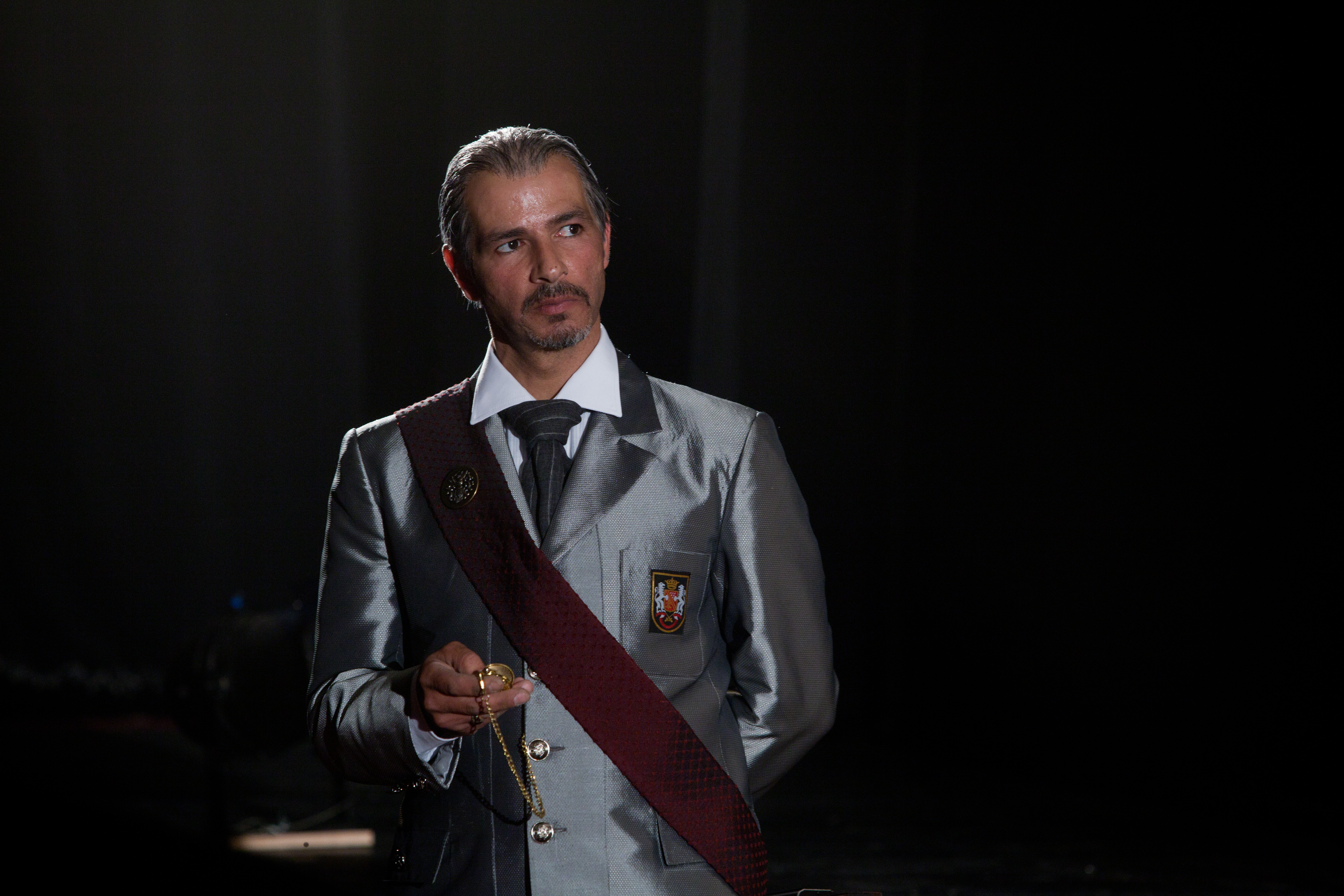 יוסי עיני במחזה "ירושלים החדשה", בבימויו של סיני פתר, תיאטרון החאן, 2012